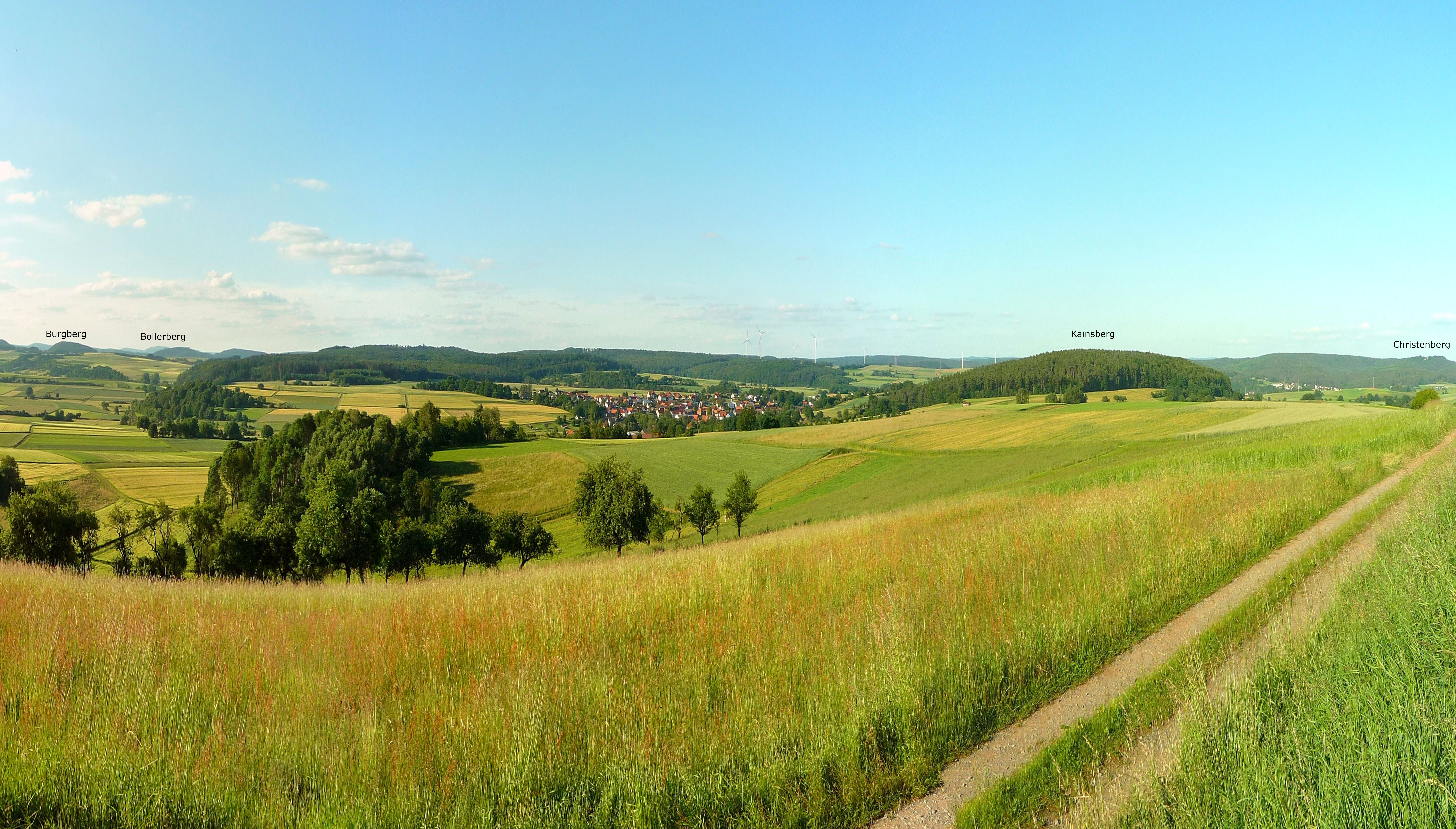 Der Ort Wollmar von Südenwesten aus gesehen